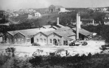 Vista geral da Indústria de Louças Zappi, 1938.